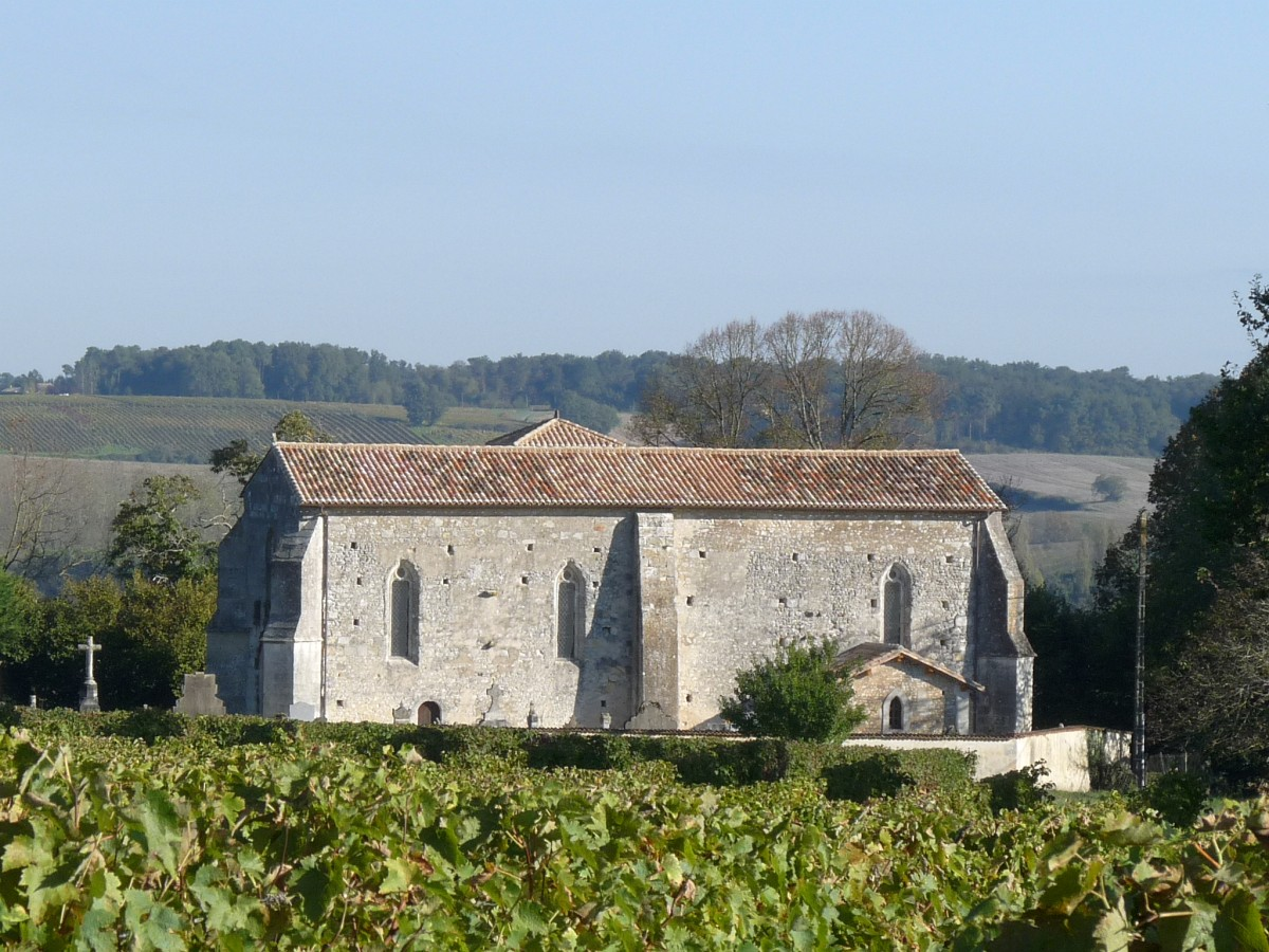 Eglise de Polignac (Charente-Maritime, France), vue du sud